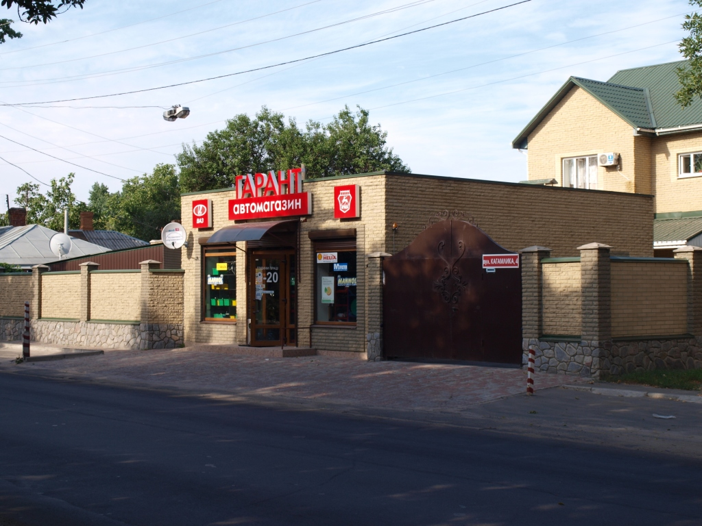 Полтава Кагамлика 4